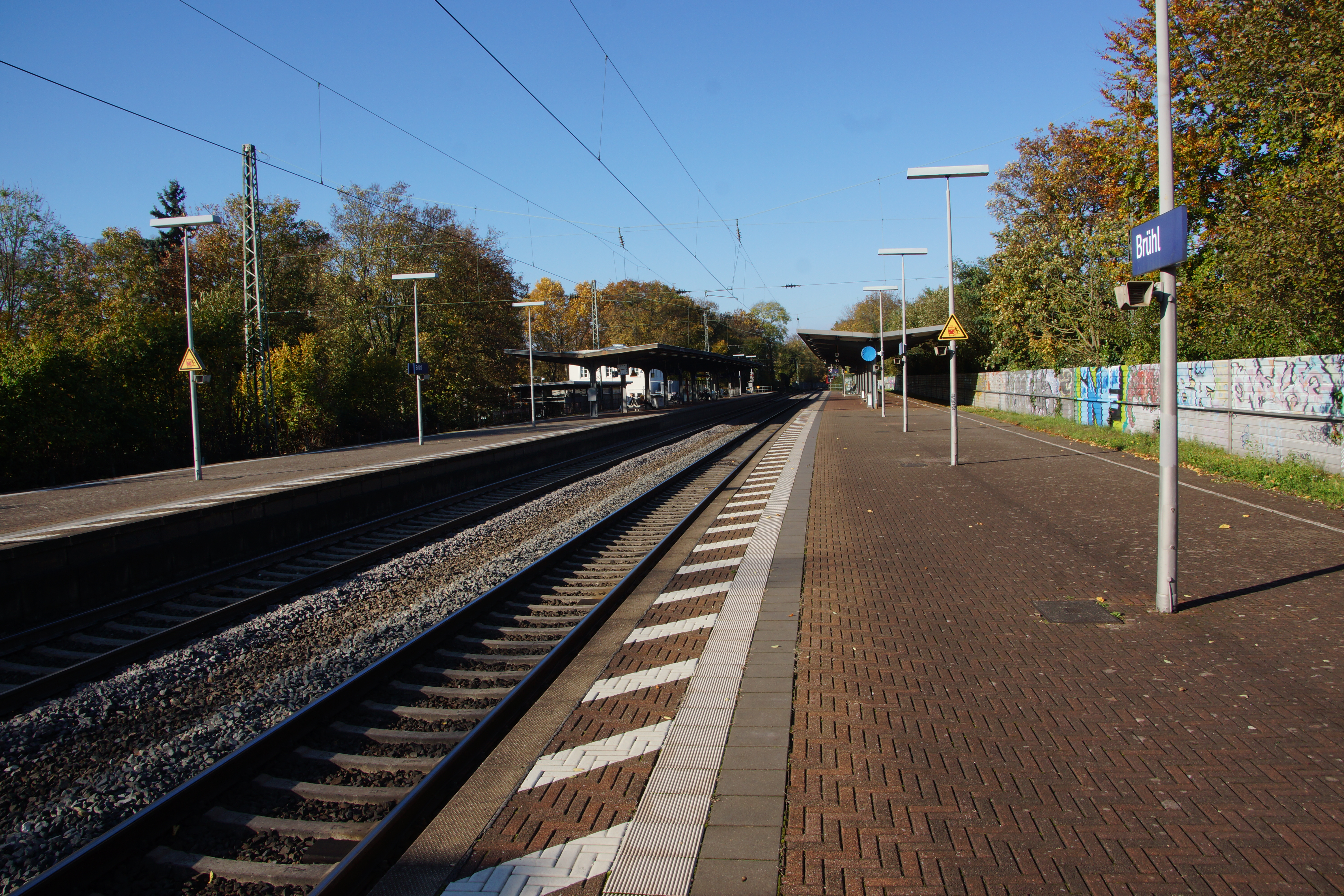 Bahnhof Brühl